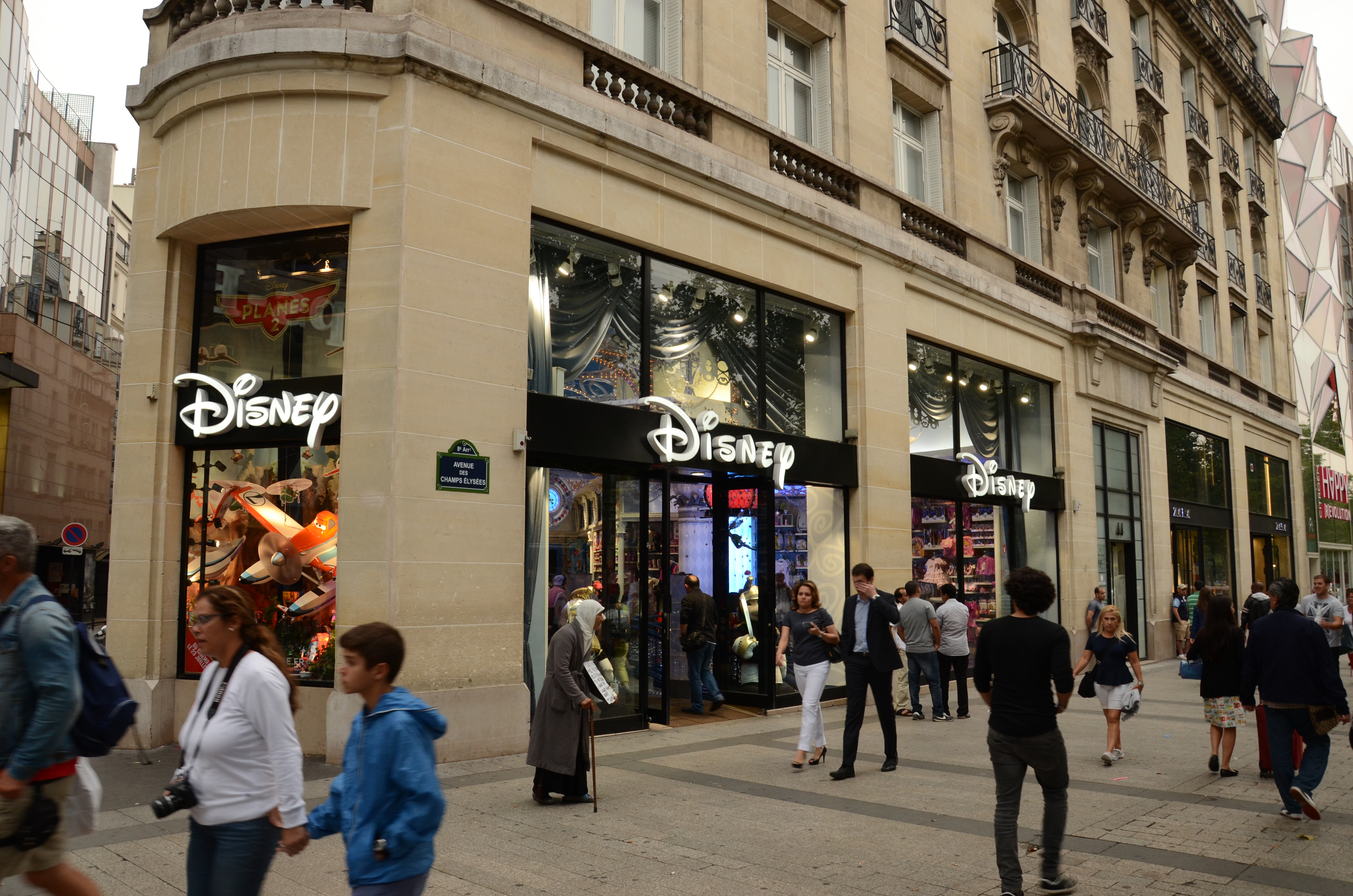 De Disney Store in Parijs, 2014.